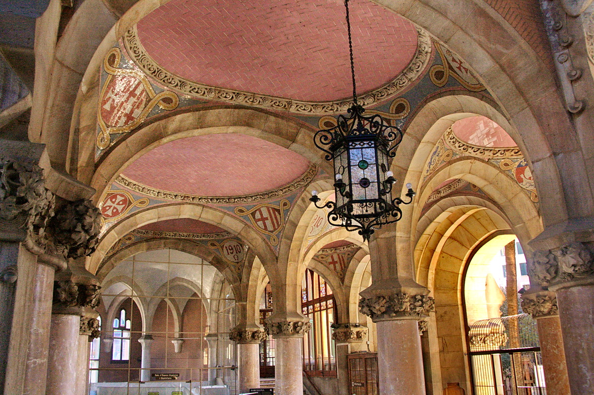 Vestíbul principal a l'edifici d'administració (detall) de l'Hospital de Sant Pau (Barcelona, Catalunya) (1902-1911)